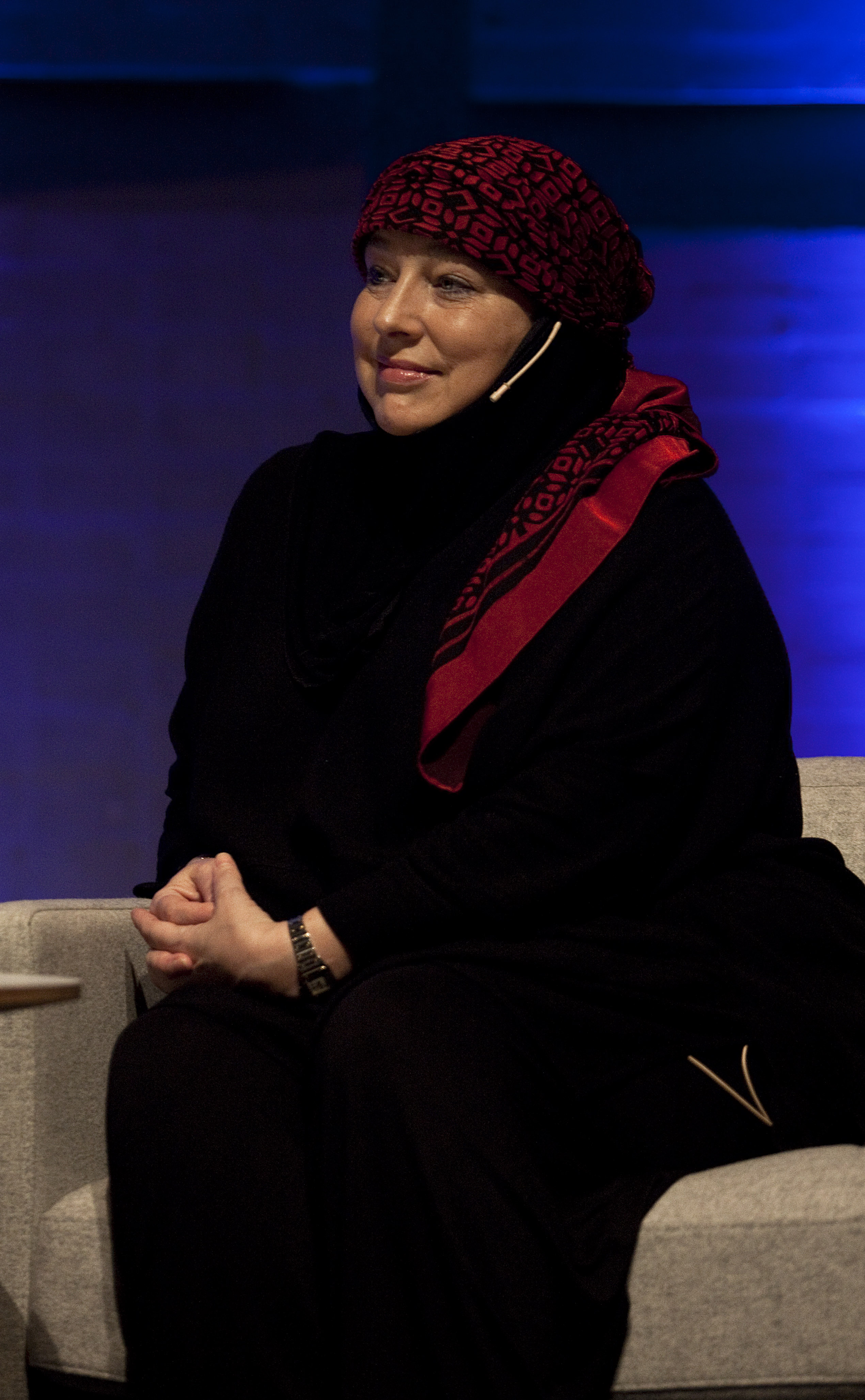 engslet av Taliban.